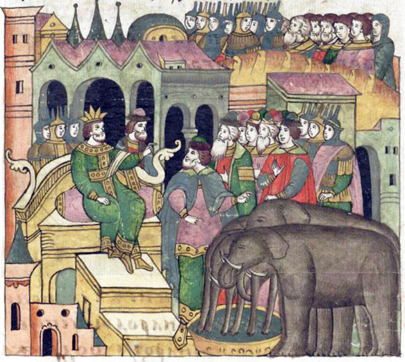 Лицевой летописный свод. Всемирная история. Книга 3. Стр. 437, иллюстрация.